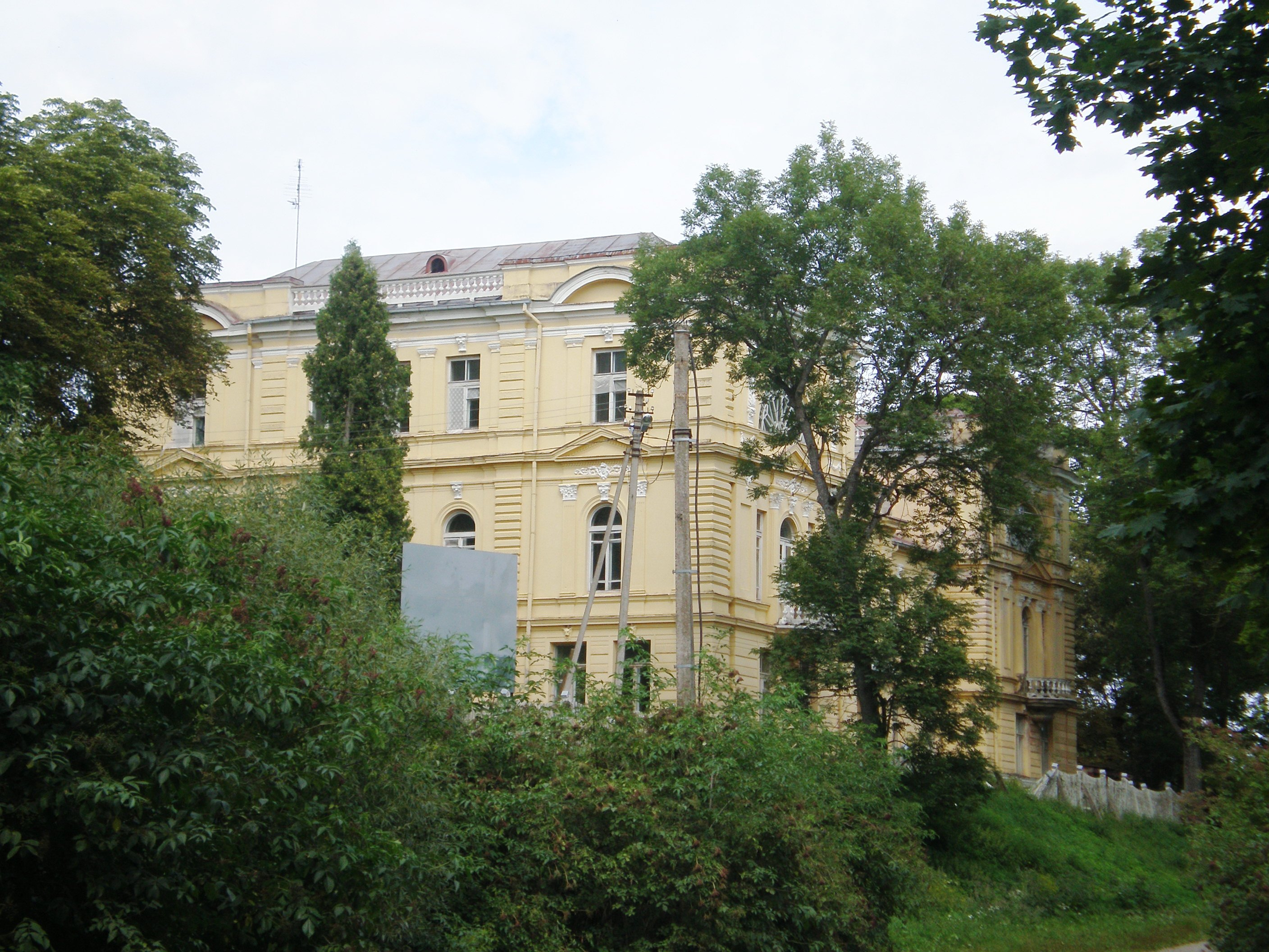 Apytalaukio dvaras, Kėdainių raj.